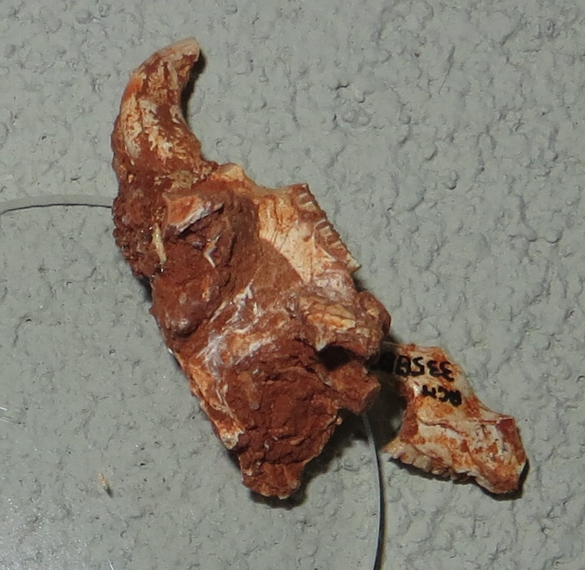 Fossil of Mikrotia, an extinct mammal - Took the picture at Naturalis, Leiden